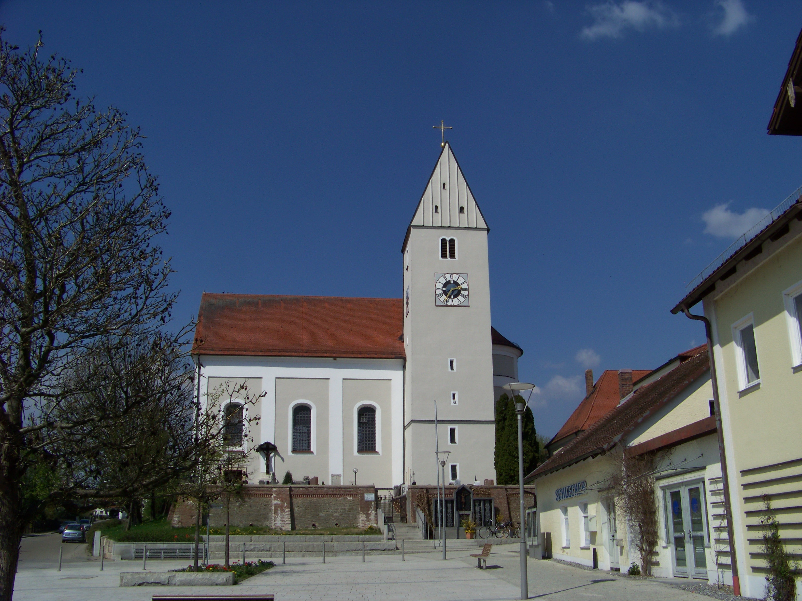 Alteglofsheim. Katholische Pfarrkirche St. Laurentius, Saalbau mit eingezogenem Chor, Flankenturm und Rahmengliederungen, 1720/22, Turm bez. 1446, Ausbau um 1600; mit Ausstattung; Friedhofsmauer, Bruchstein und Ziegel, um 1870/80.